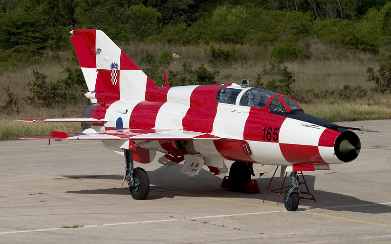 Mig21 croate couleur damier